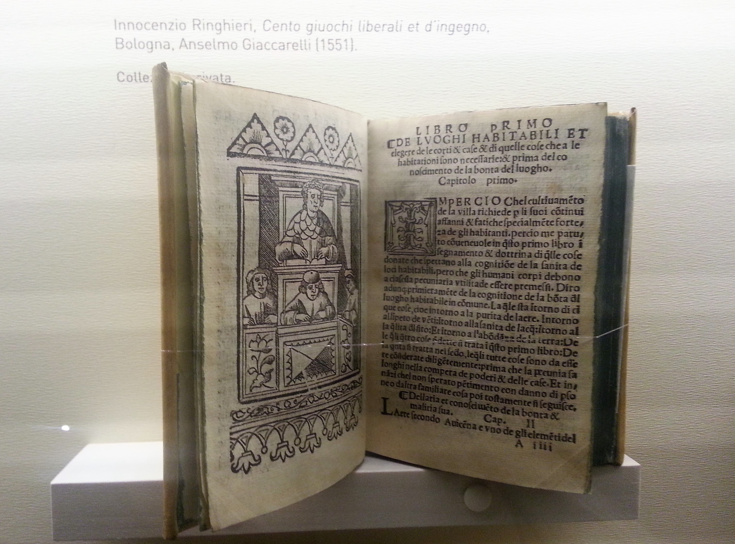 Testo antico esposto nel museo del cinquecento-Anselmo Giaccarelli